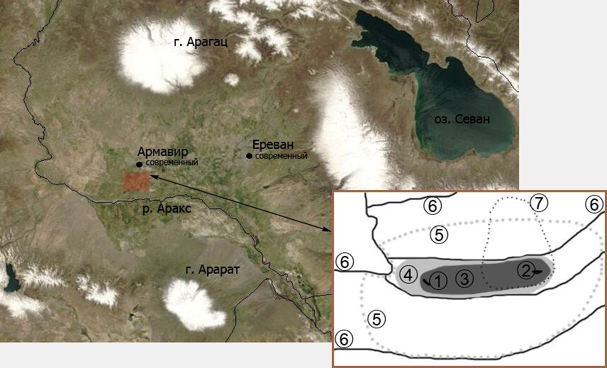 Argishtihinili plan